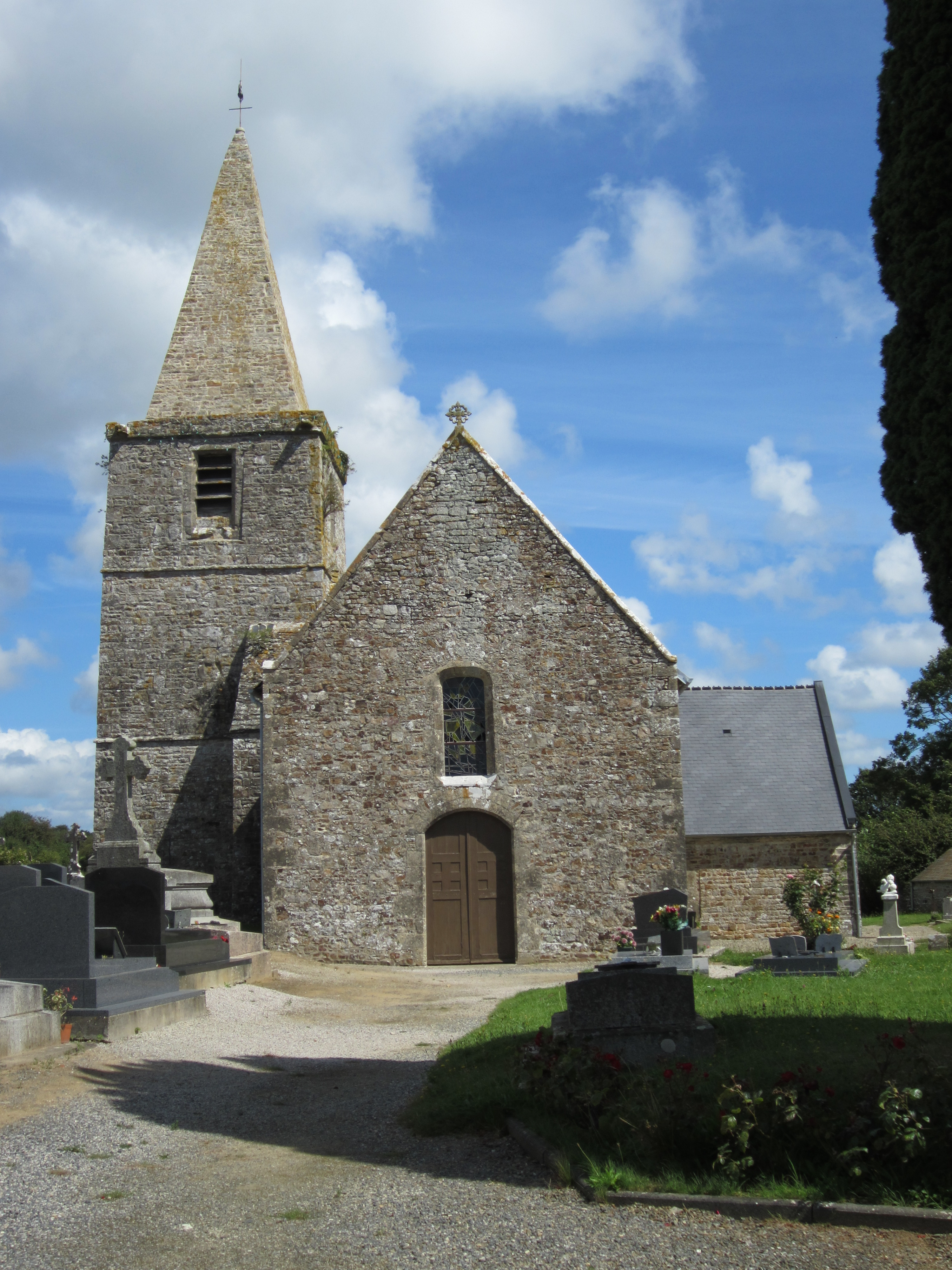 Saint-Maurice-en-Cotentin